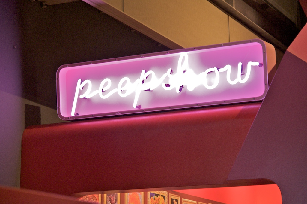 Peepshow, 2006Franse tuin (Grenst aan de tuinzalen. Franse tuin na een ontwerp van mevrouw Canneman in de jaren ’60) Peepshow